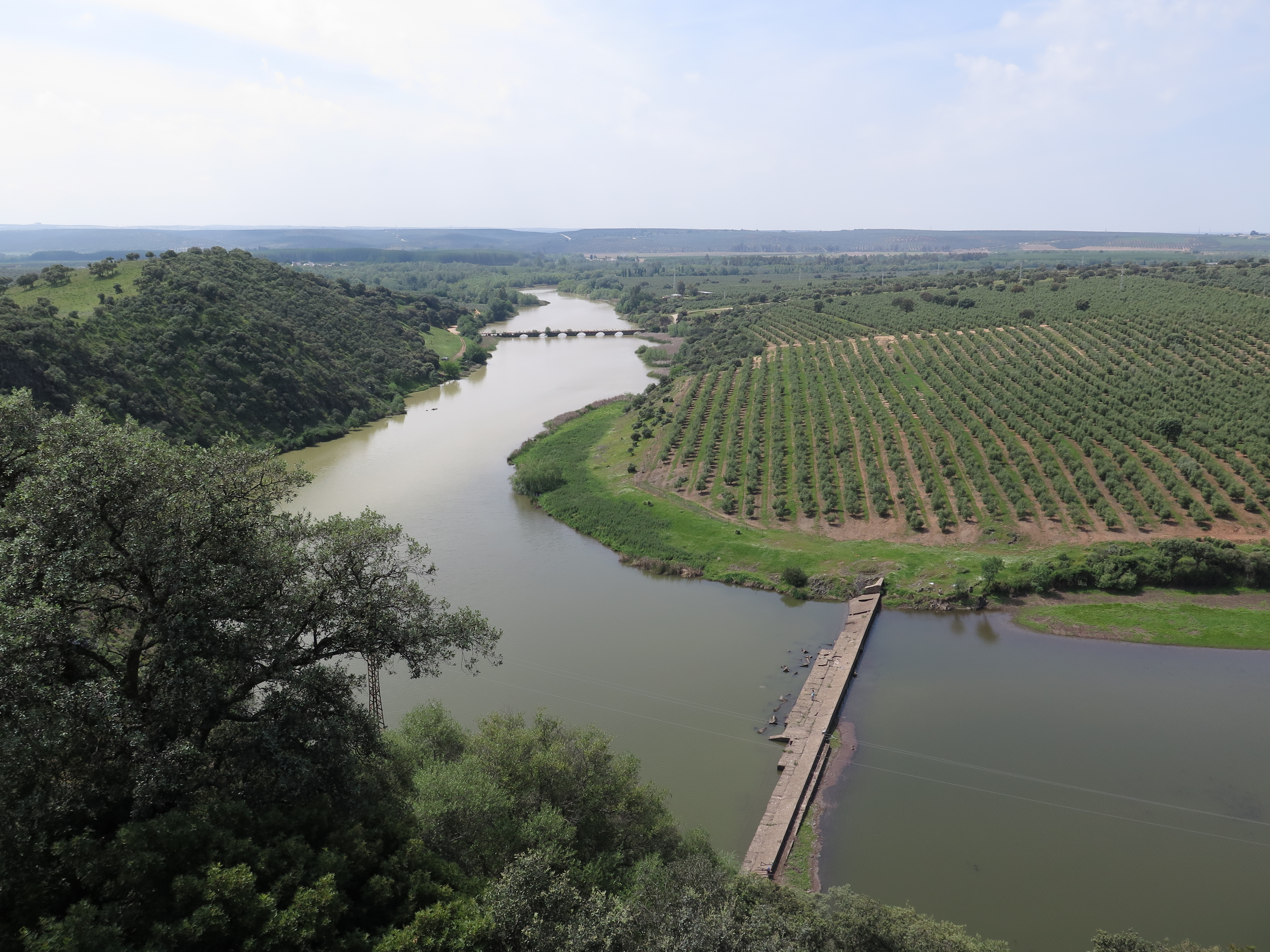 Parque Natural de la Sierra de Andújar: Río Jándula a la altura de la curva de Valdezorras.